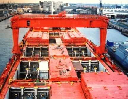 Das Kühlcontainerschiff Monte Rosa in Hamburg IMO Number: 9283215 MMSI Number: 211691000 Callsign: DGHJ Length: 272 m Beam: 40 m